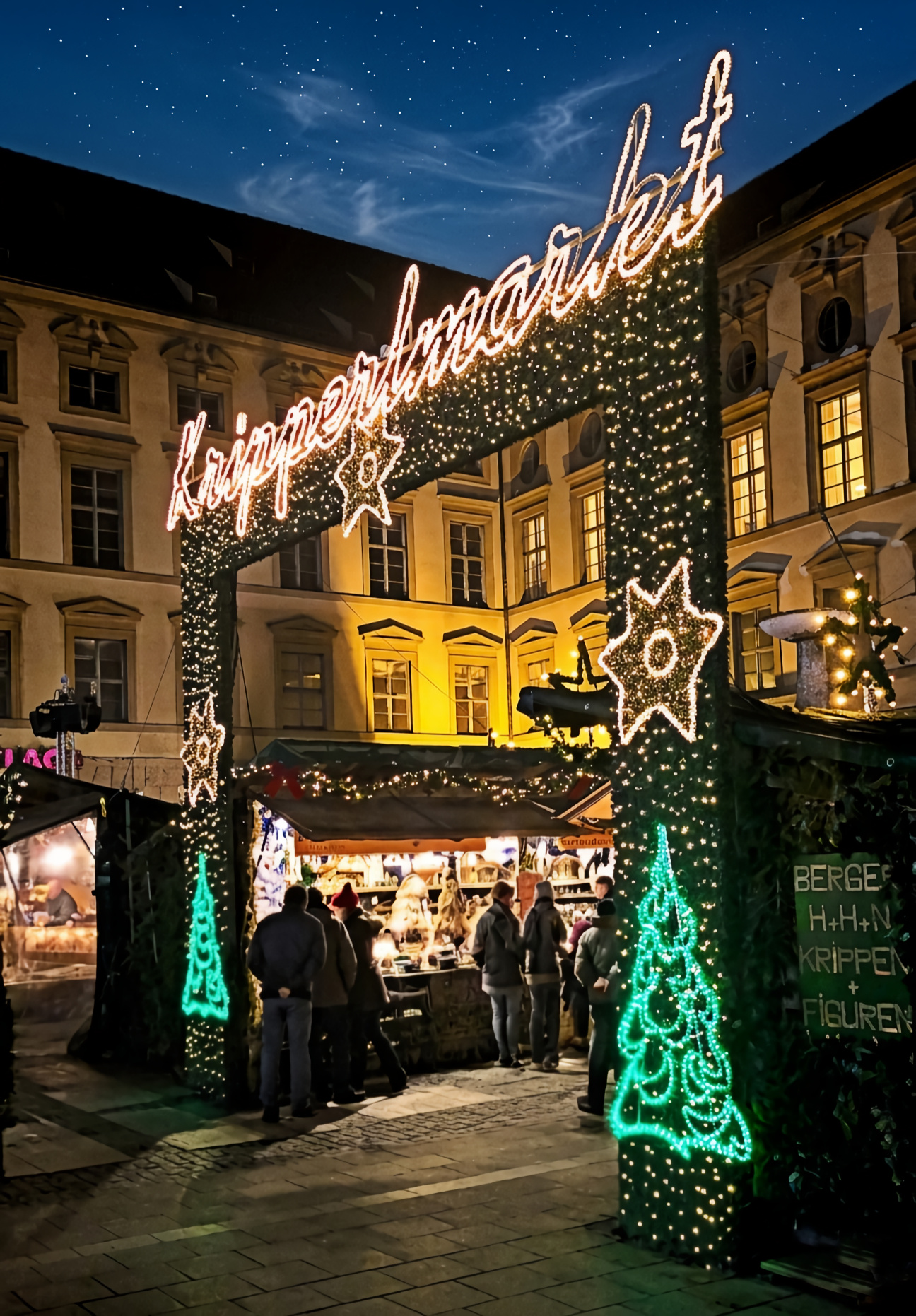 Kripperlmarkt in München in der Neuhauserstraße, rund um den Richard-Strauss-Brunnen im Dezember 2016